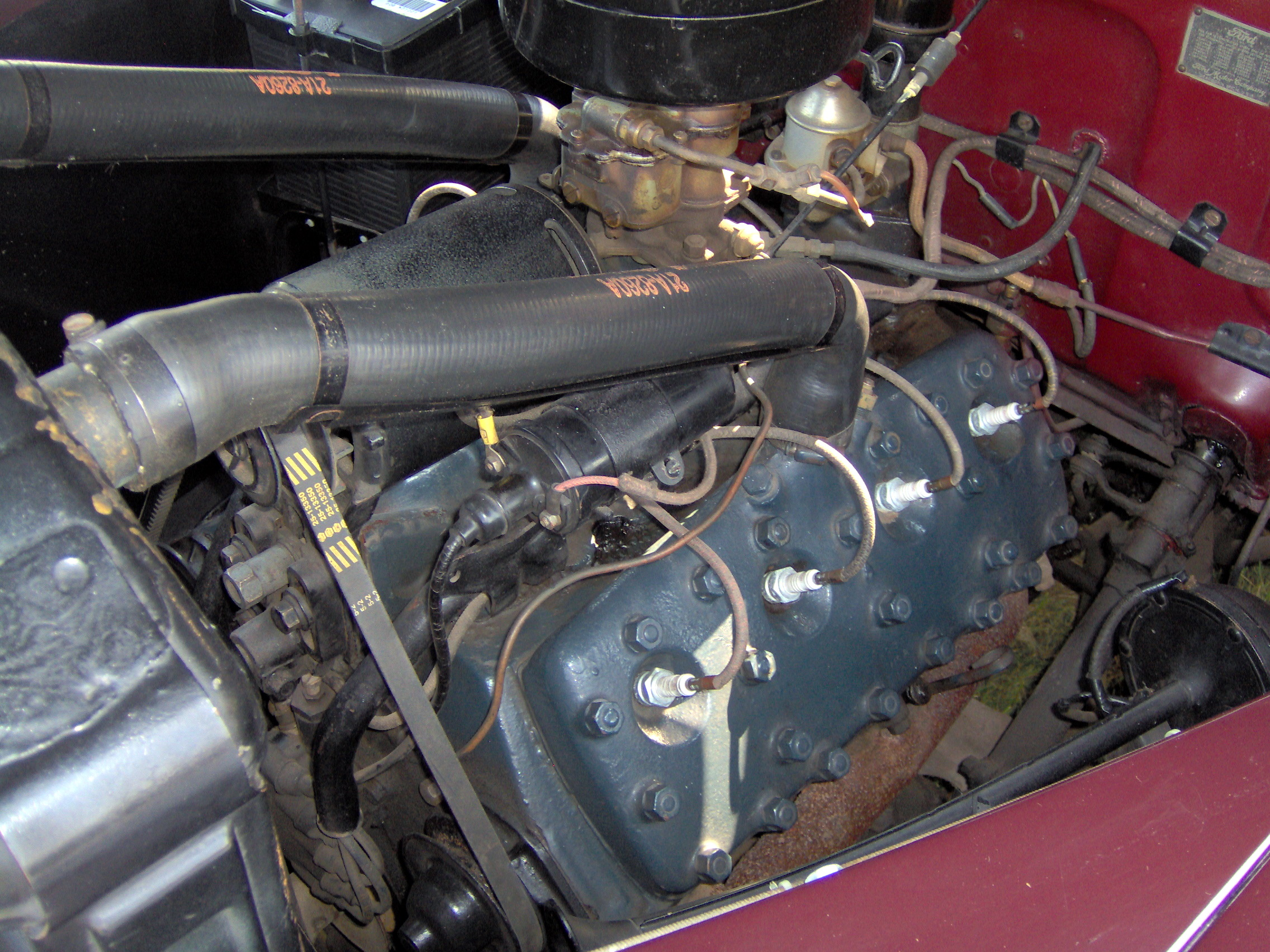 1942 Ford Super Deluxe